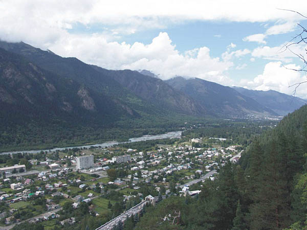 город-курорт Теберда